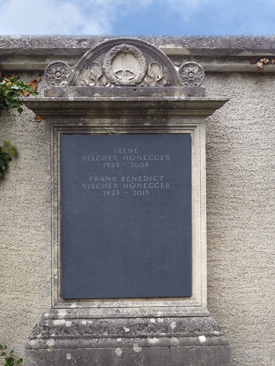 Frank Benedict Vischer-Honegger (1923–2015) Rechtswissenschaftler, Grab auf dem Friedhof Wolfgottesacker, Basel